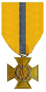 het Bronzen Kruis is een Koninklijke onderscheiding die is ingesteld bij Koninklijk Besluit van 11 juni 1940. Eigen scan van een kruis in mijn verzameling.